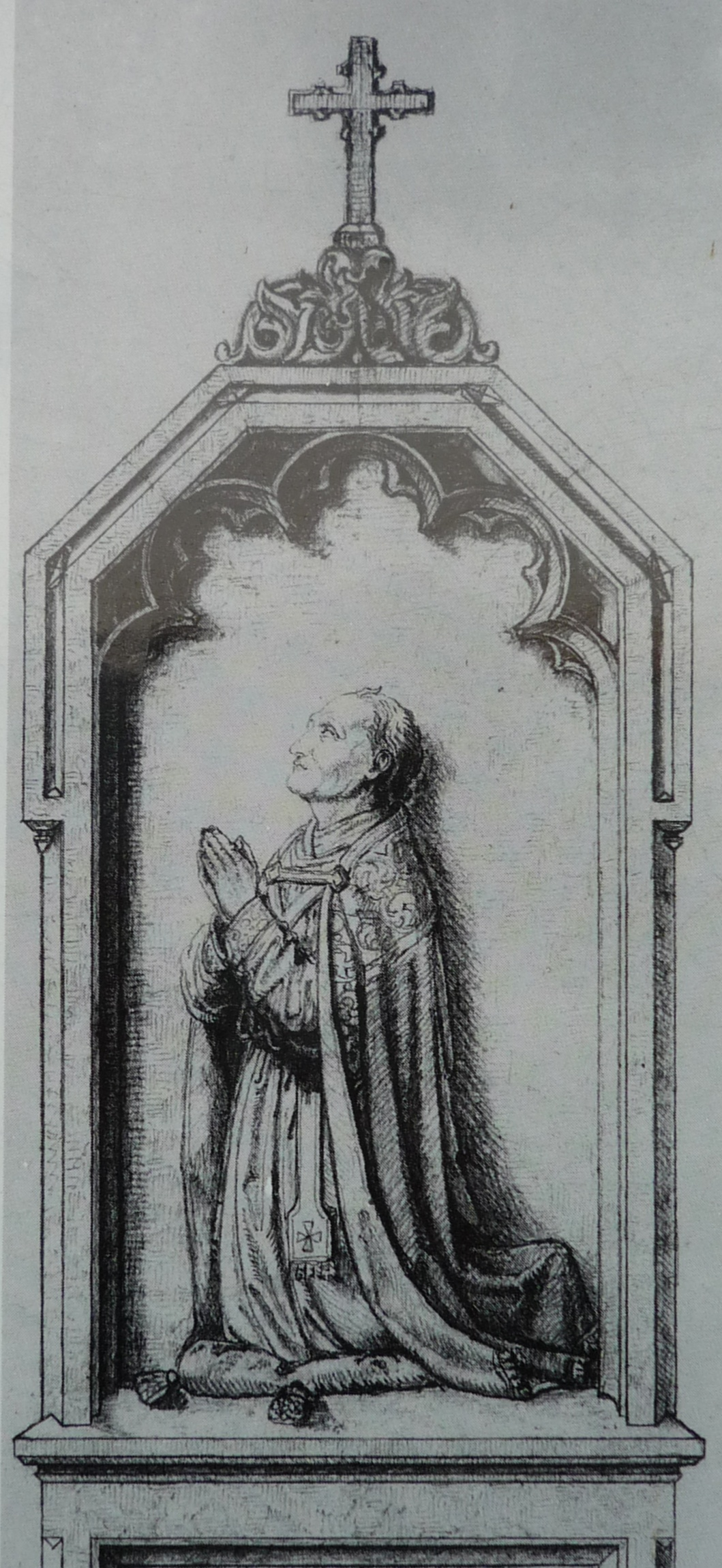 Epitath für Pantaleon Rosmann auf einer Informationstafel vor der ehemaligen Spitalkirche in Breisach